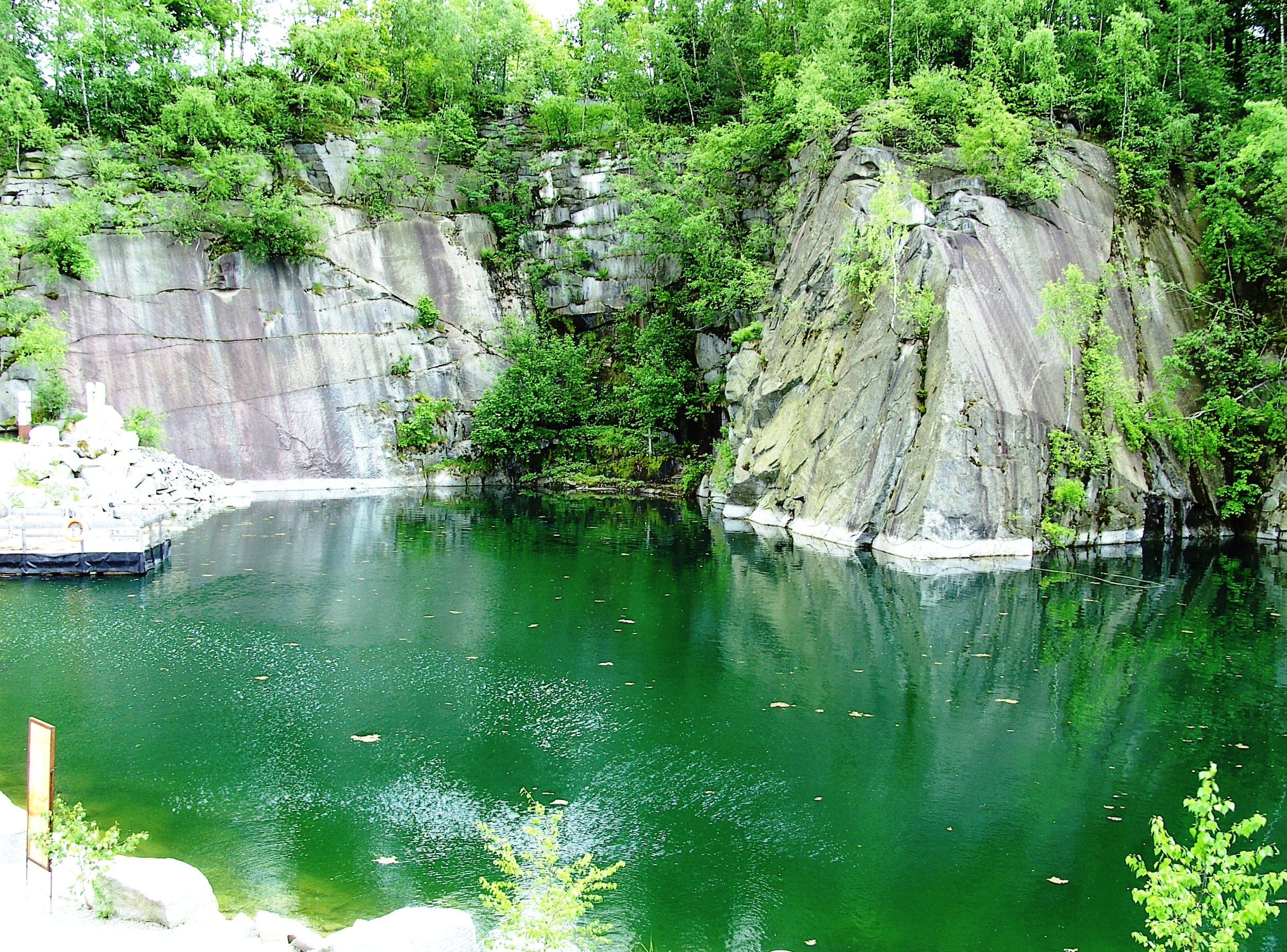 Außenbereich des Granitzentrums Hauzenberg.